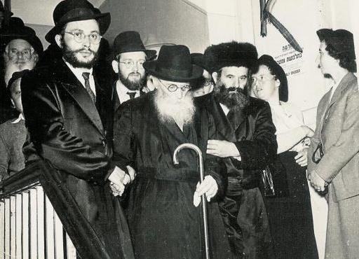 החזון איש, ראשית שנות ה-50 של המאה ה-20